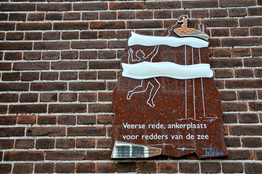 Het kunstwerk 'Veerse rede, ankerplaats voor redders van de zee' gemaakt door kunstenaar Toos van Holstein (Eindhoven 1949) op de hoek van de Kaai en de Markt.